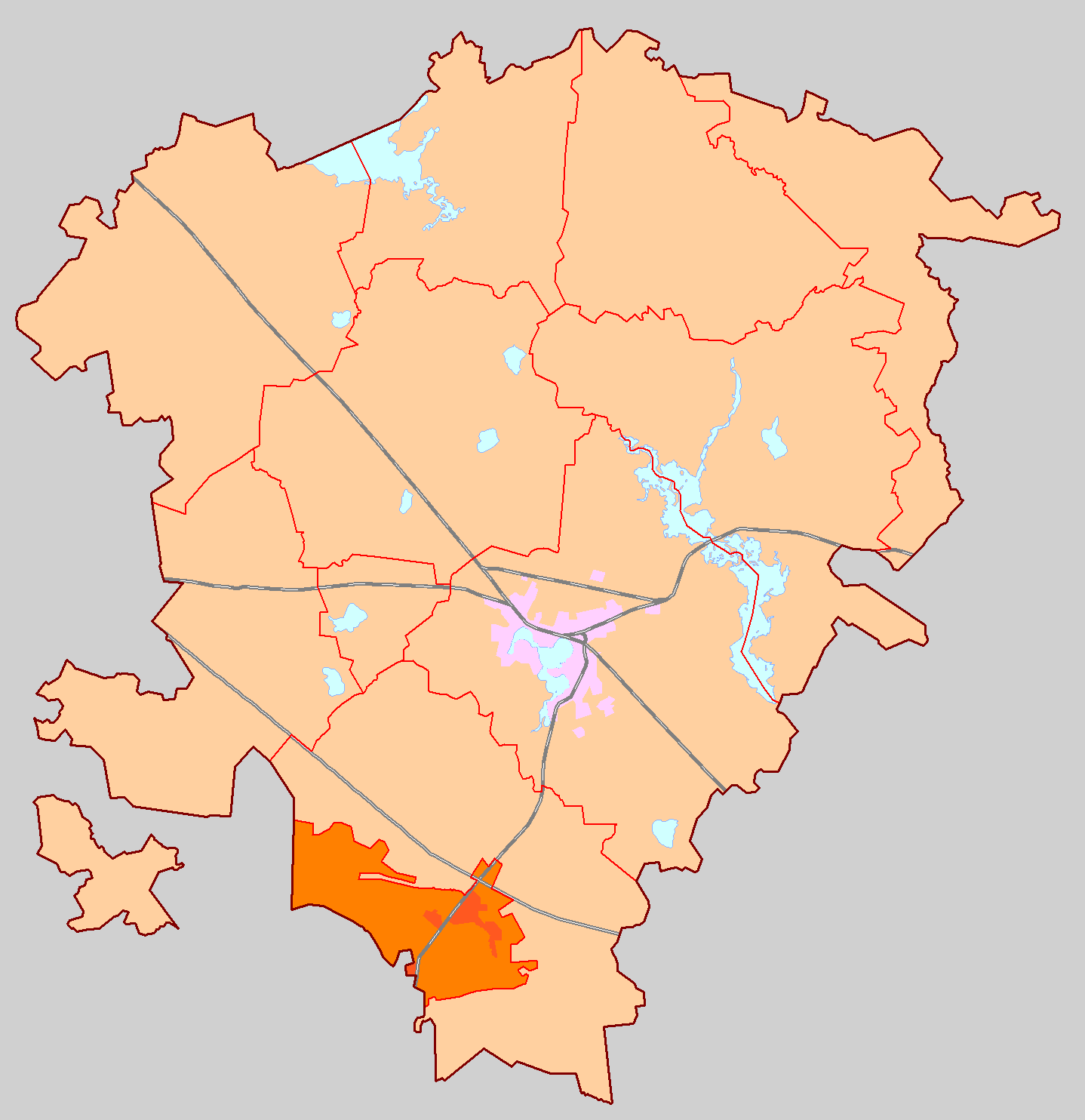 Схема Куженкинского городского поселения в Бологовском р-не